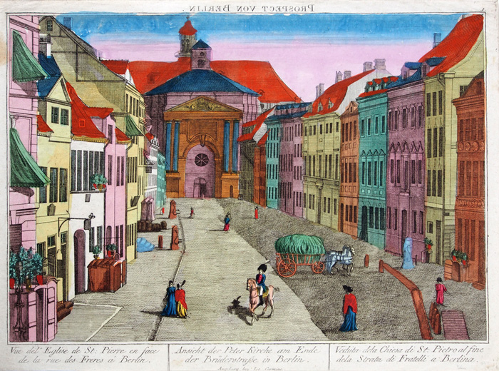 Ansicht der Peter Kirche am Ende der Brüderstraße in Berlin. Prospect von Berlin. Vue de l’Eglise de St. Pierre. Veduta dela Chiesa di St. Pietro. Altkolorierter Kupferstich. Guckkastenblatt. Augsburg, Carmine, um 1800. Bildgröße 27,5 x 39,5 cm, Blattgröße 30,5 x 41,5 cm